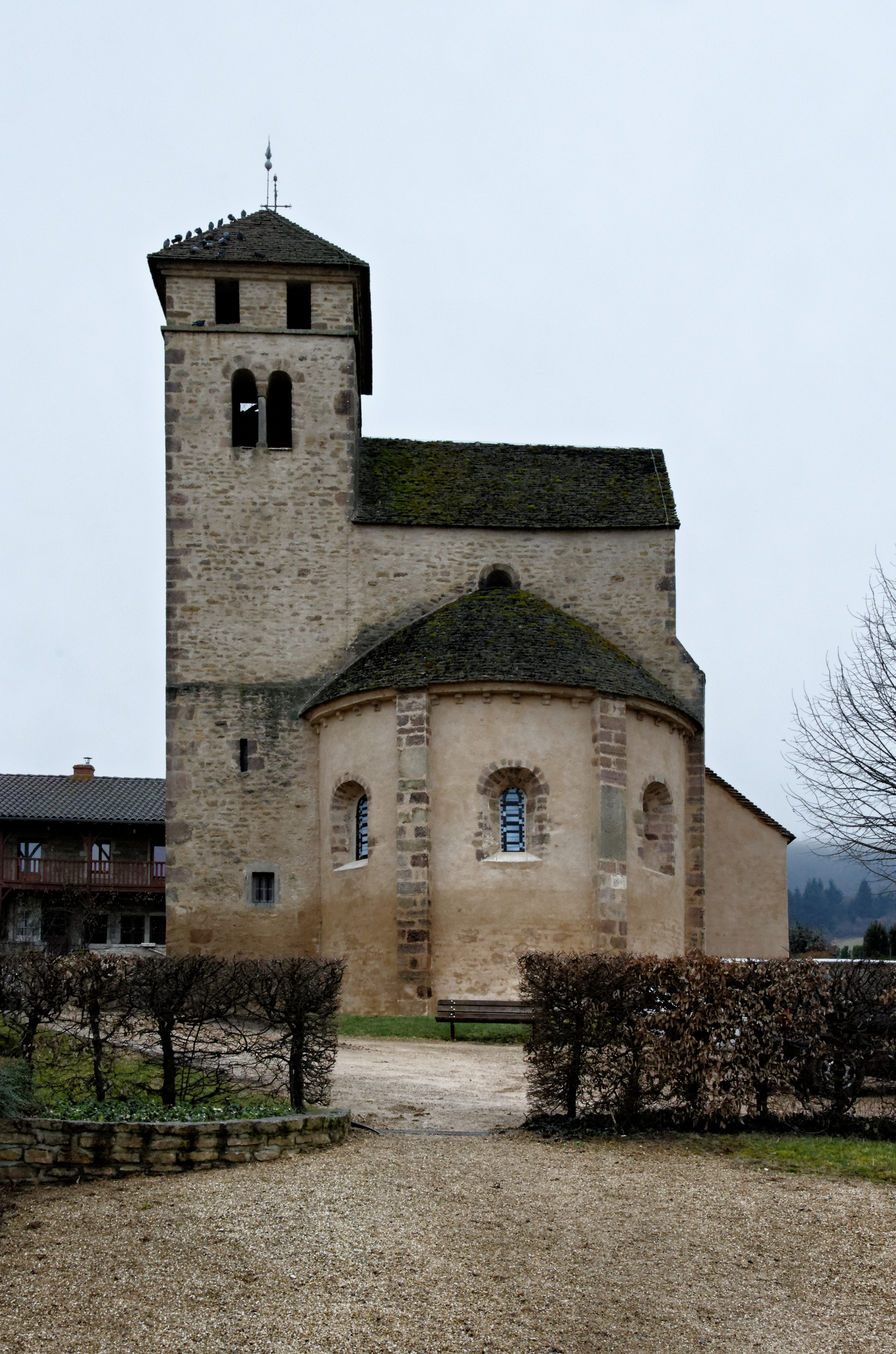 Eglise de Sologny, Saône et Loire (71), France